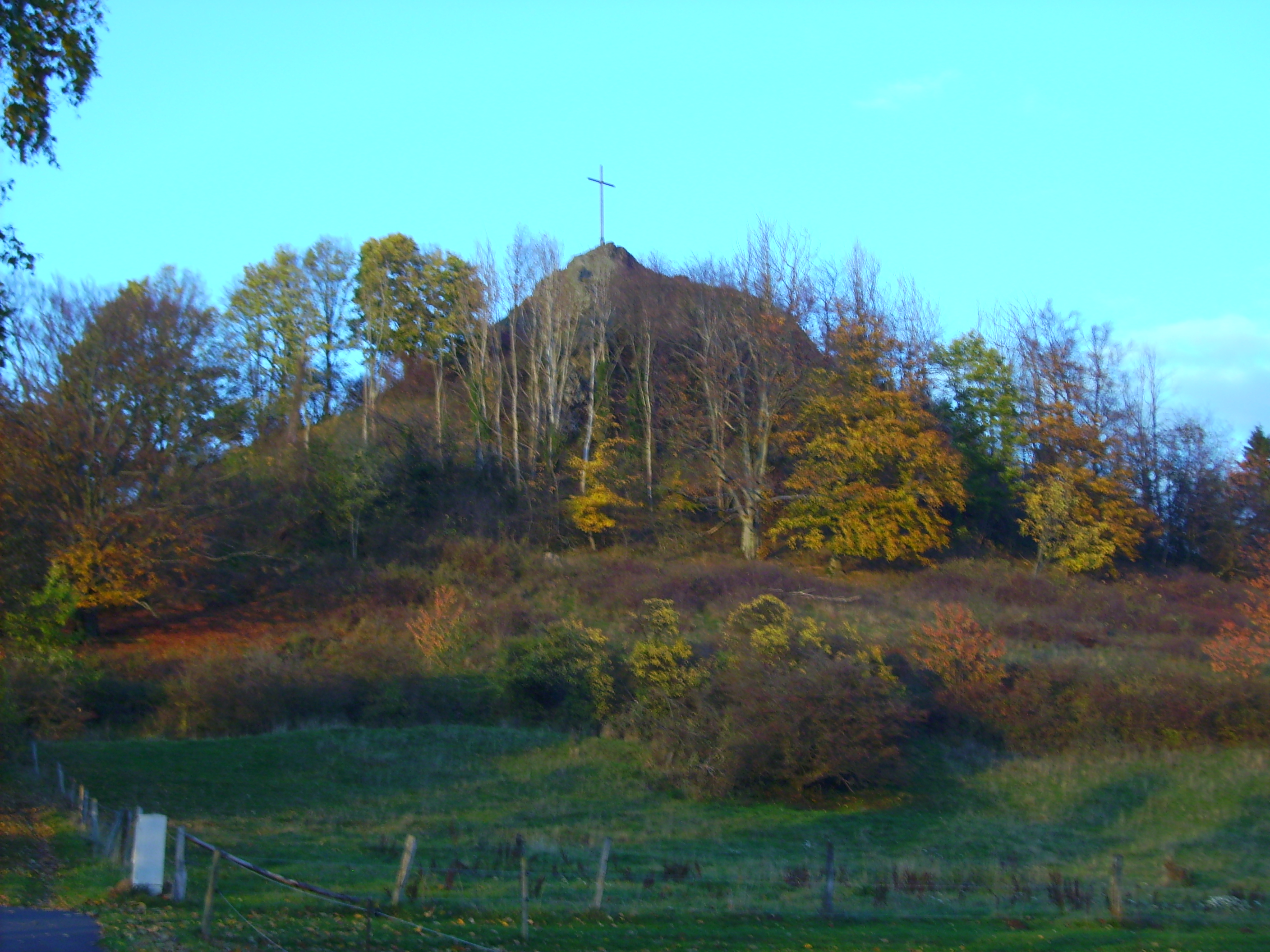 Wachtküppel, Berg in der Rhön, Hessen, Kreis Fulda, Gemeinde Gersfeld